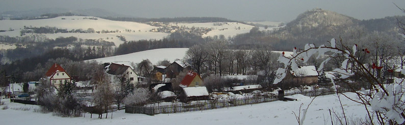 Sovolusky s Blanskem, 2006 (foto M. Thelenová)